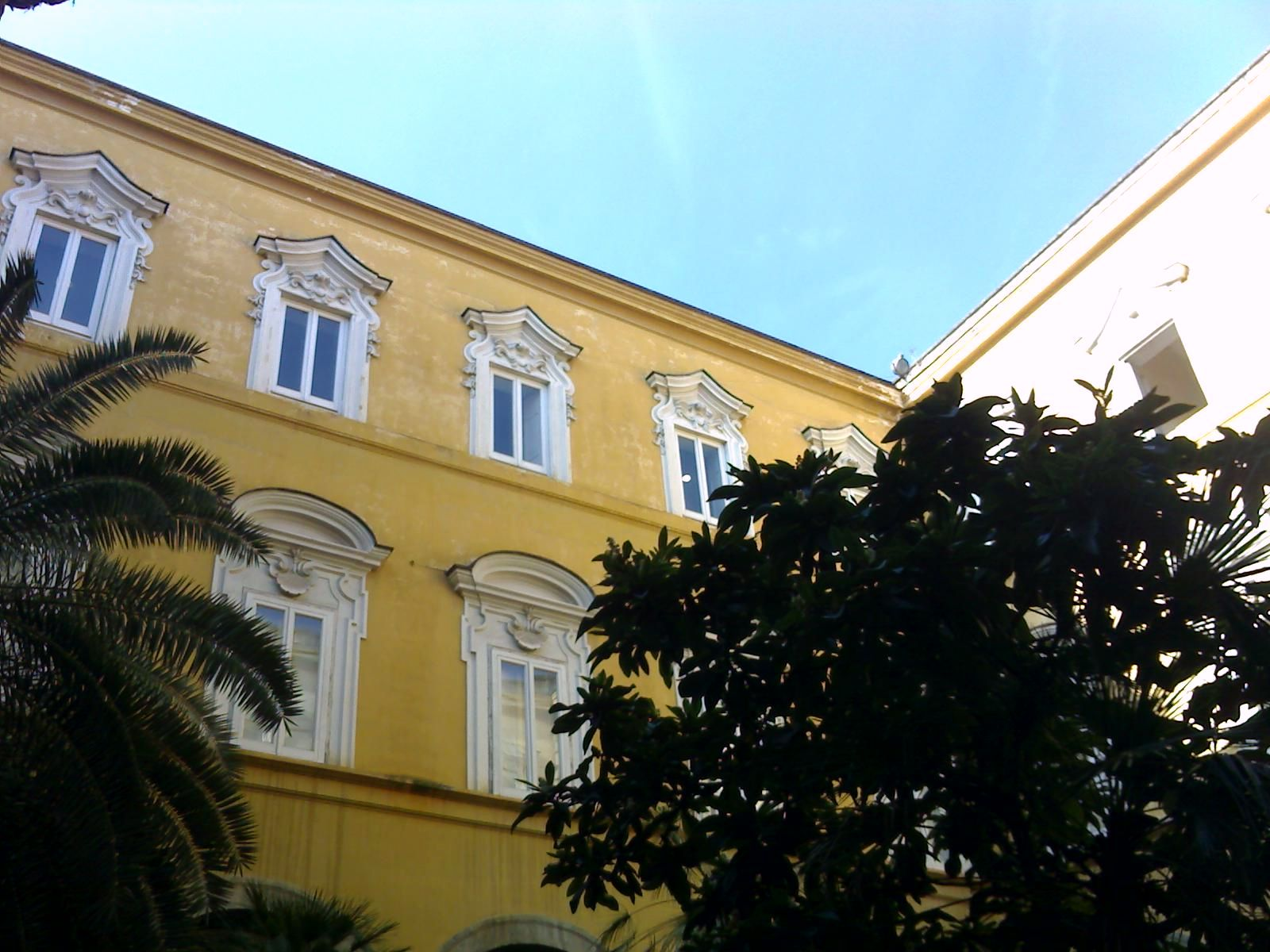 Chiostro piccolo del conservatorio di San Pietro a Majella (Napoli)